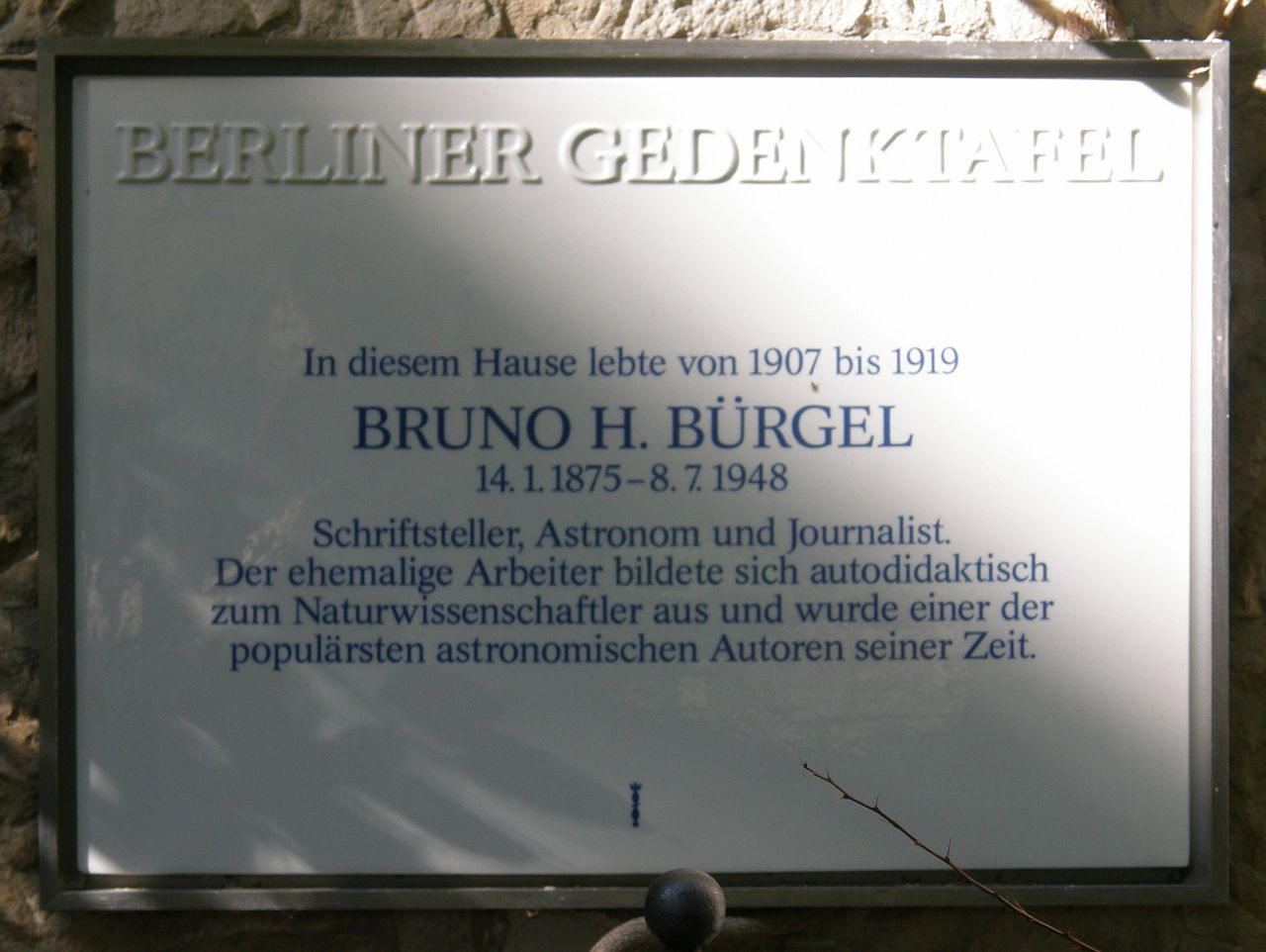 Berliner Gedenktafel für Bruno H. Bürgel. Beerenstraße 39, Berlin-Zehlendorf